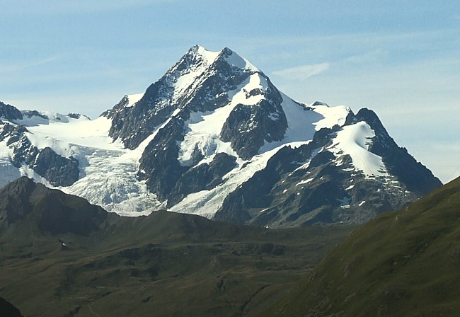 Tré-la-Tête (3816 m) Picture taken by user Idefix august 2006